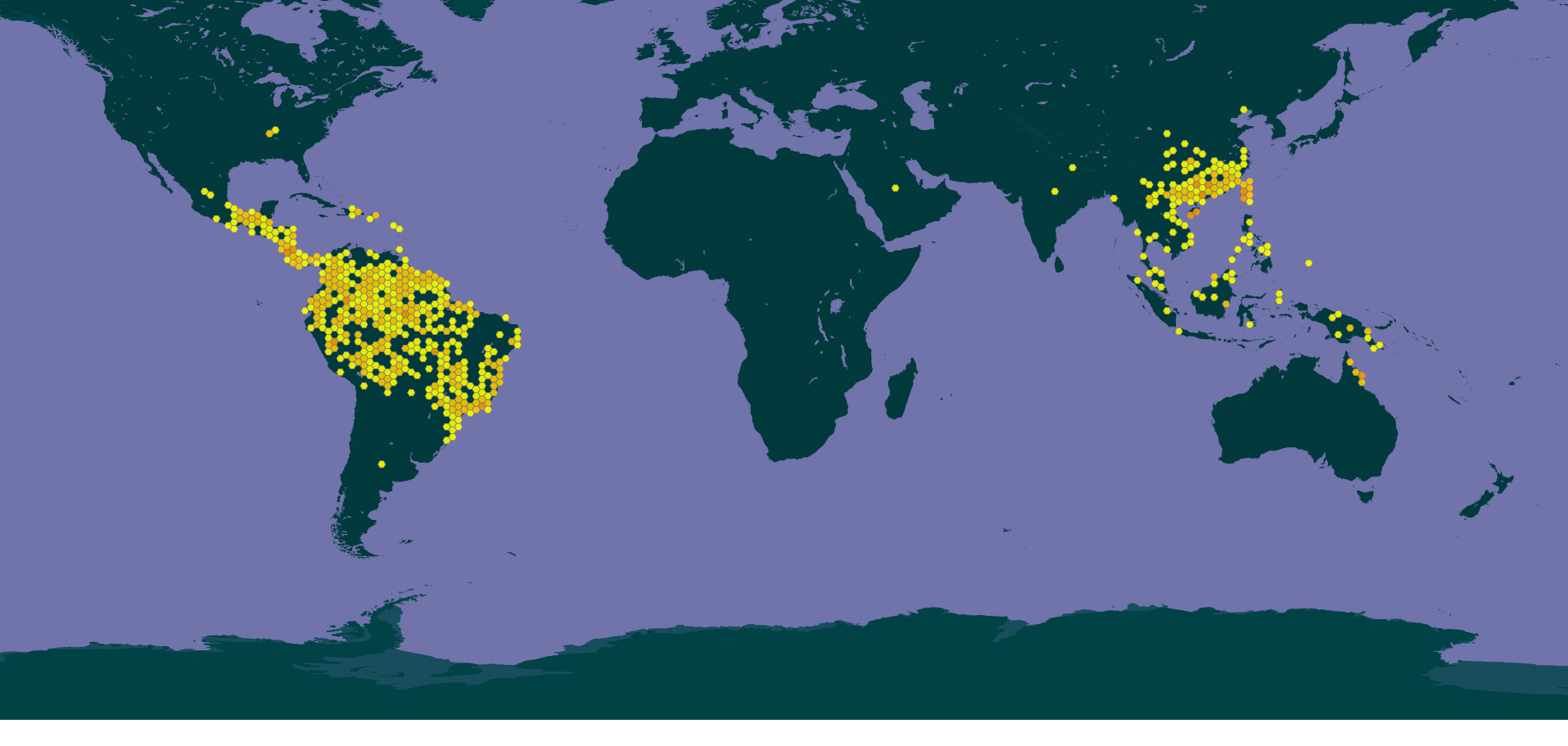 Mapa GBIF de distribuição do gênero vegetal Ormosia.